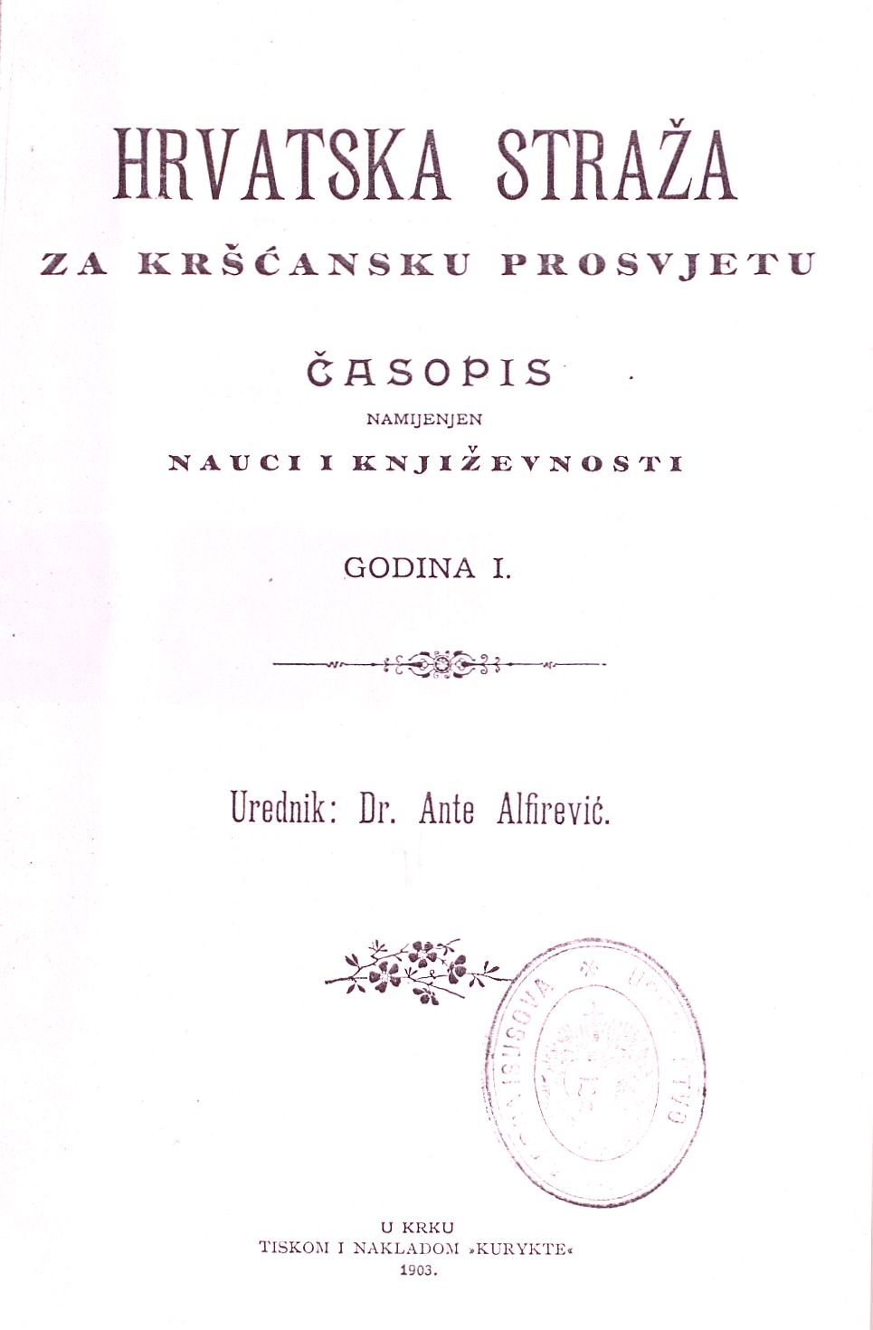 Cover of Hrvatska straža